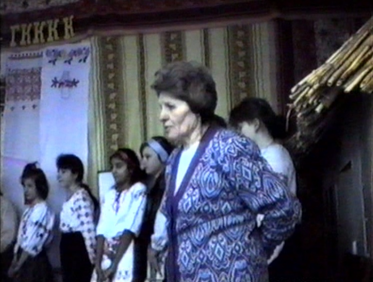 Зустріч ветеранів у селі Мар'ївка Баштанського району 1994 р.